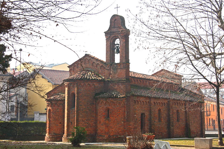 La chiesa romanica di San Pietro a Robbio (PV), vista dal lato absidale